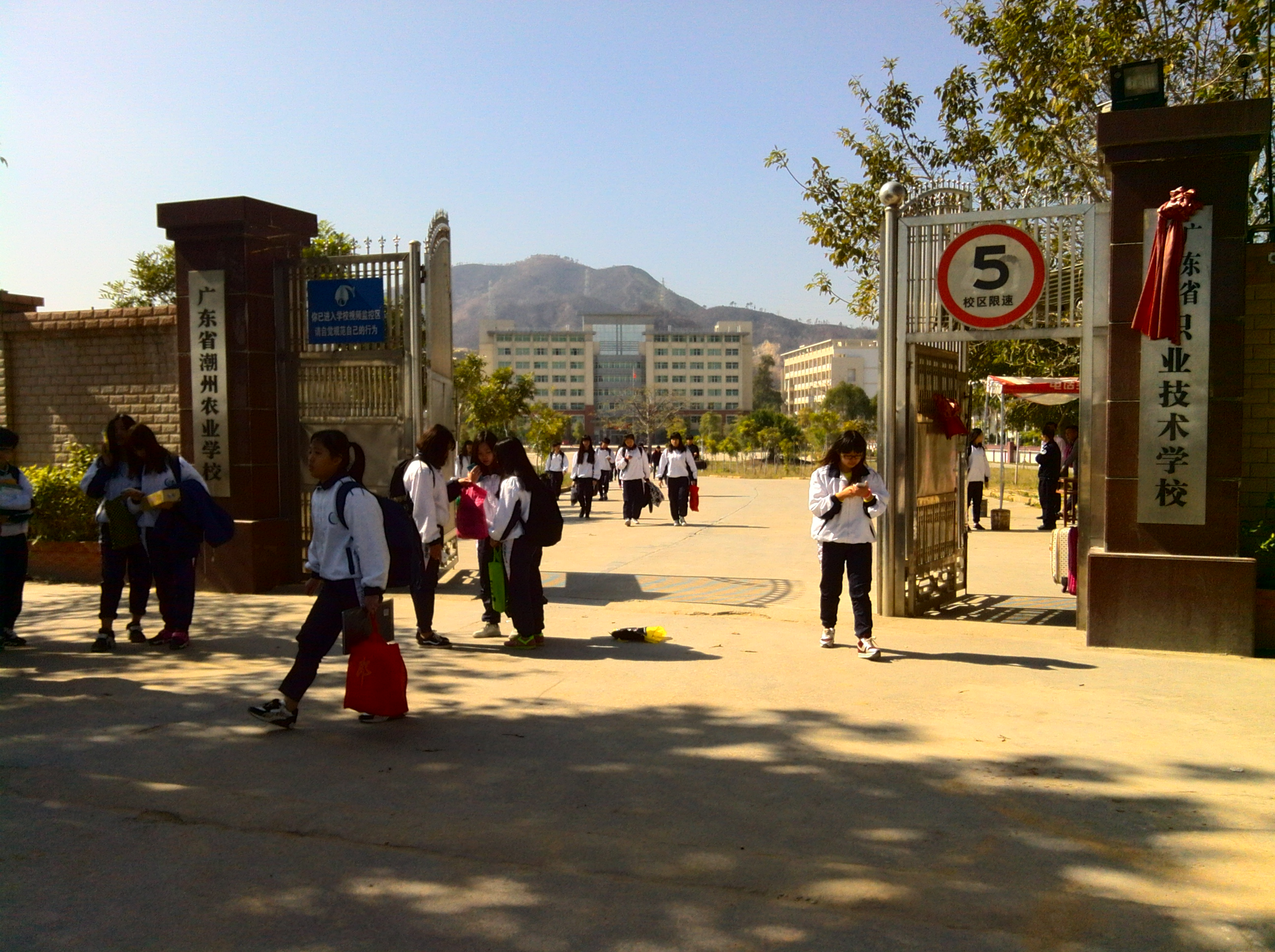 潮州市职业技术学校校门（枫洋校区）